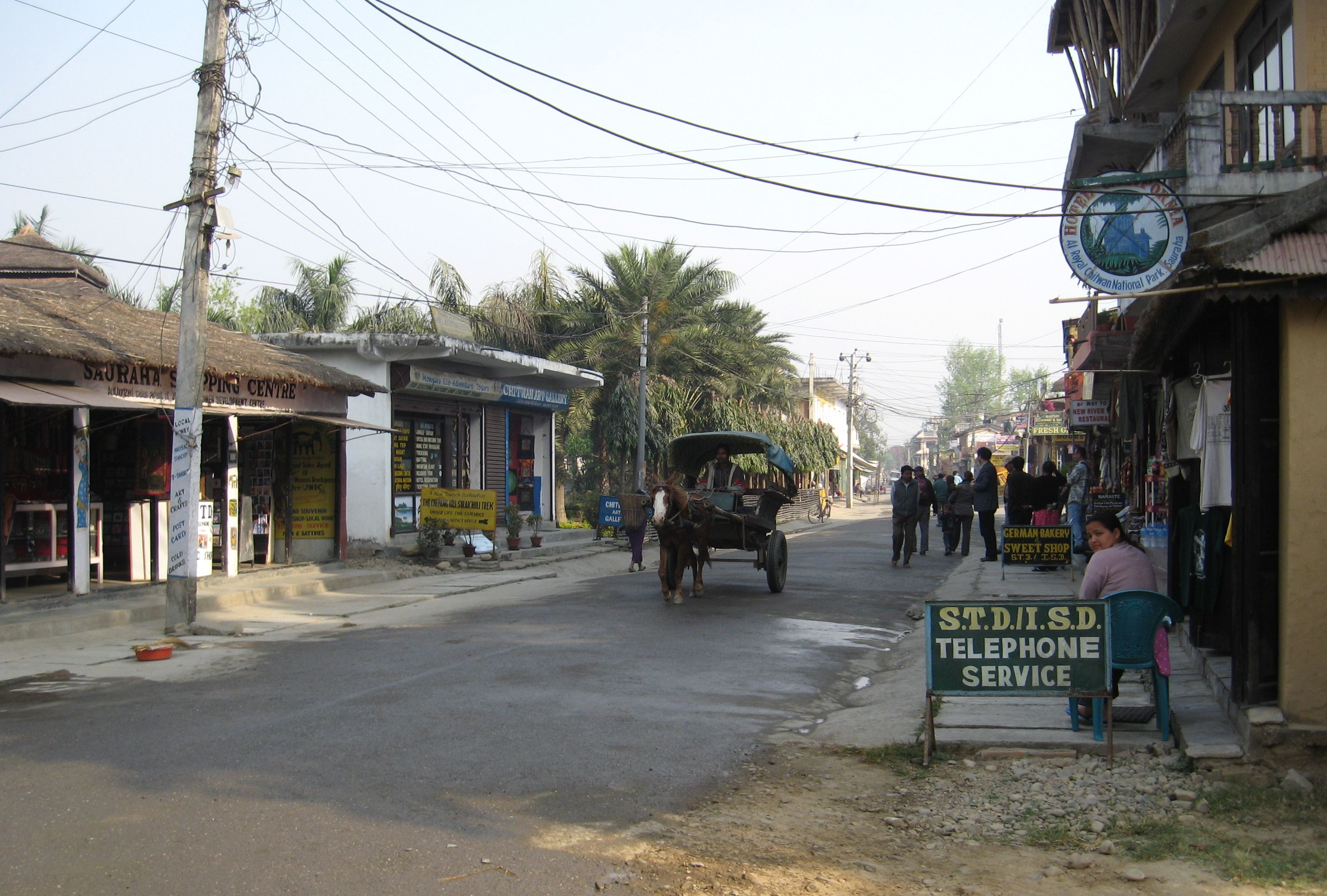 Sauraha